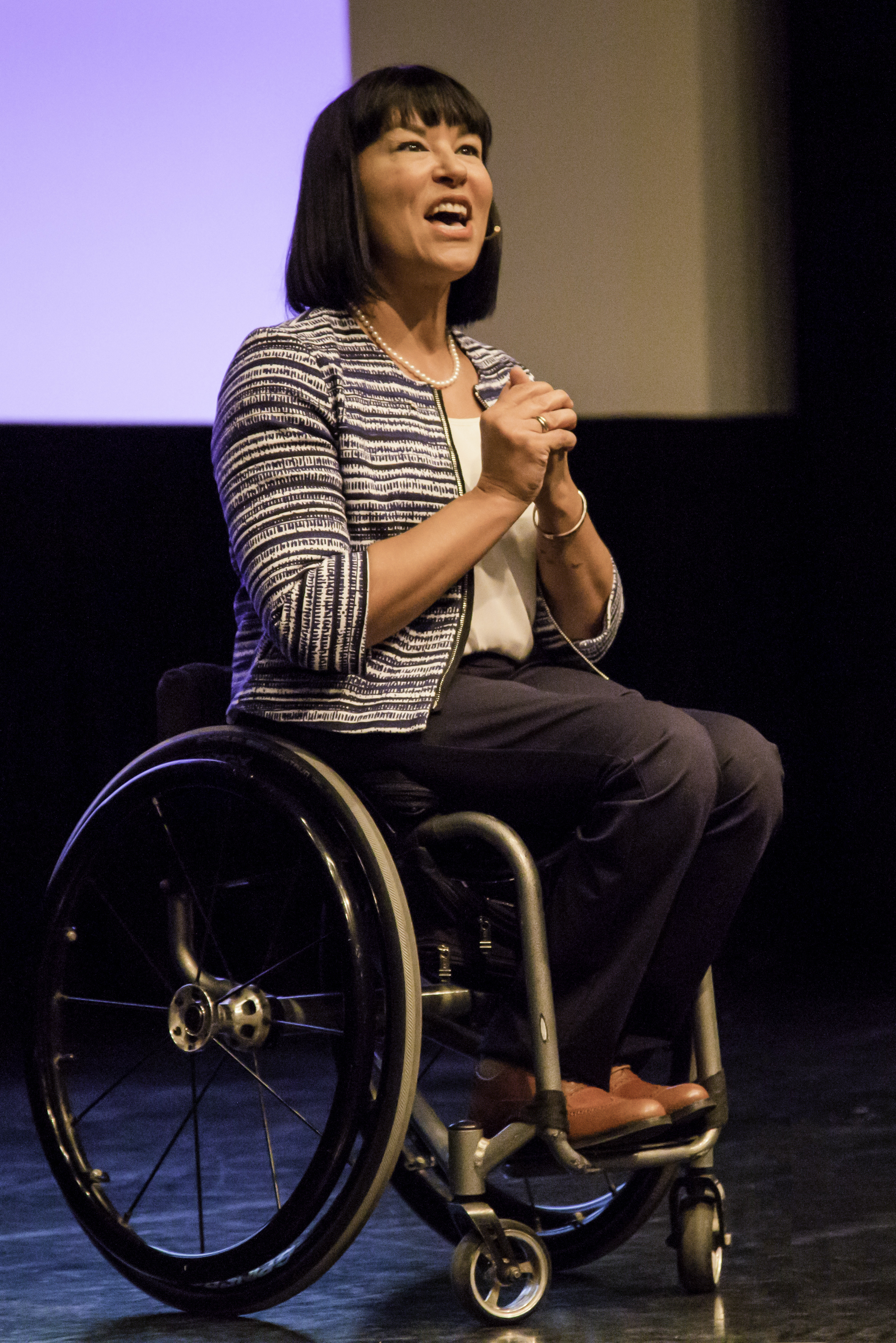 Madame Chantal Petitclerc, en conférence dans le cadre du Rendez-vous des bibliothèques publiques du Québec - 2017.